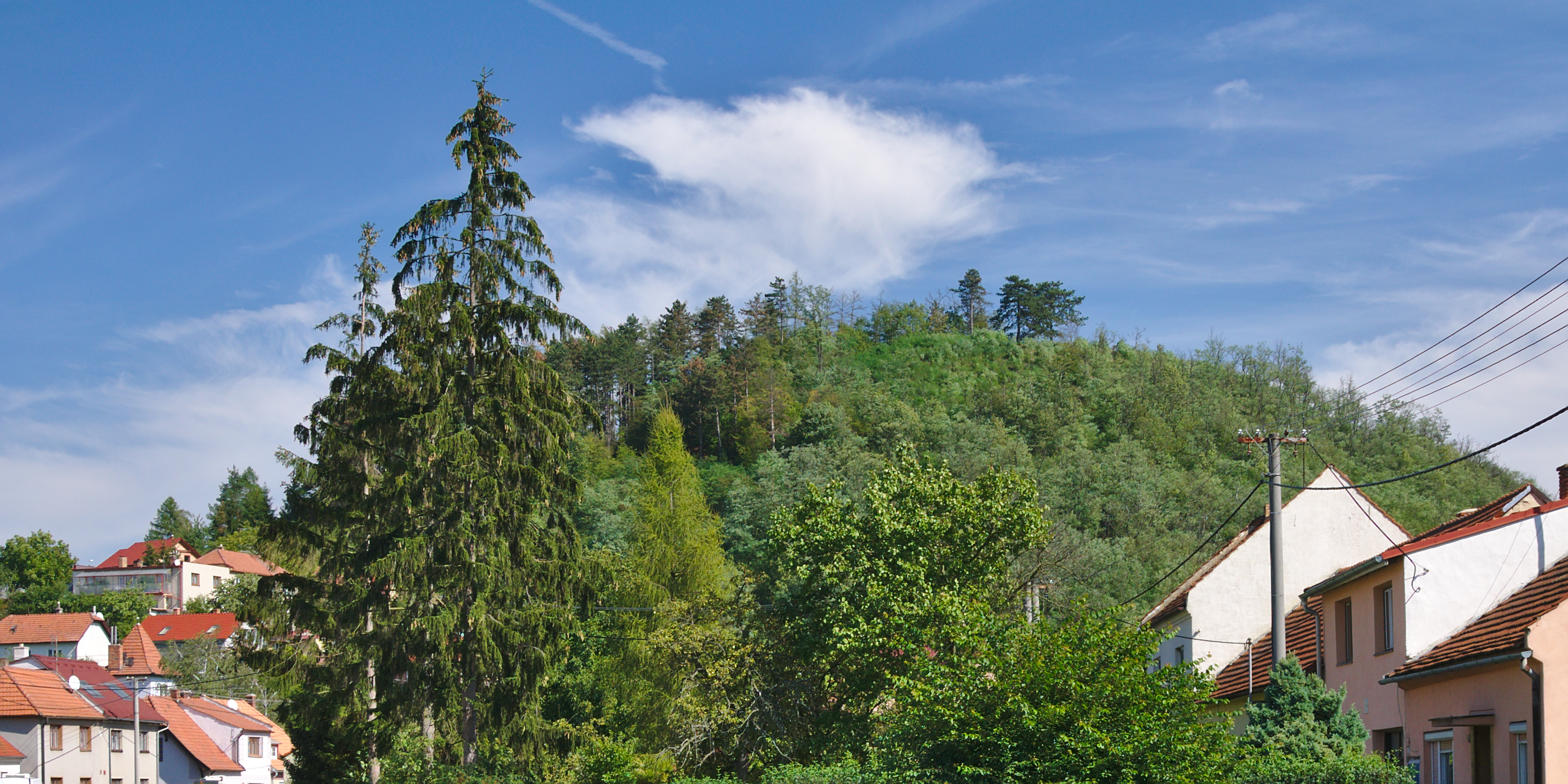 Kopec Hradisko, Svitávka, okres Blansko